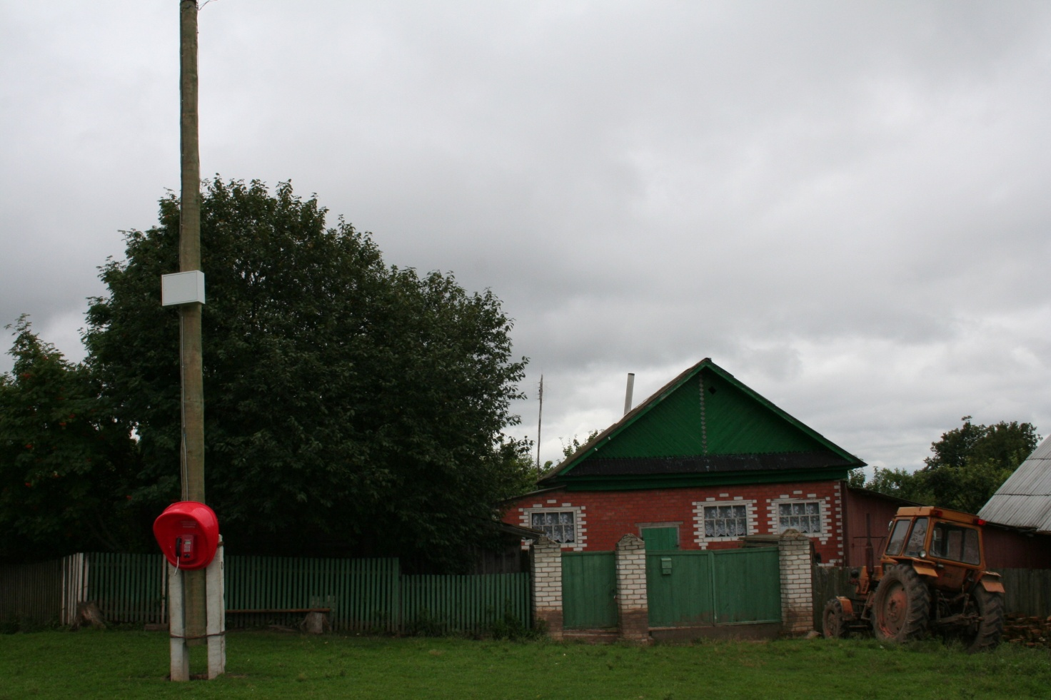 Кырык мары: Ӧлицӓ Ӓвӓсирӹштӹ.